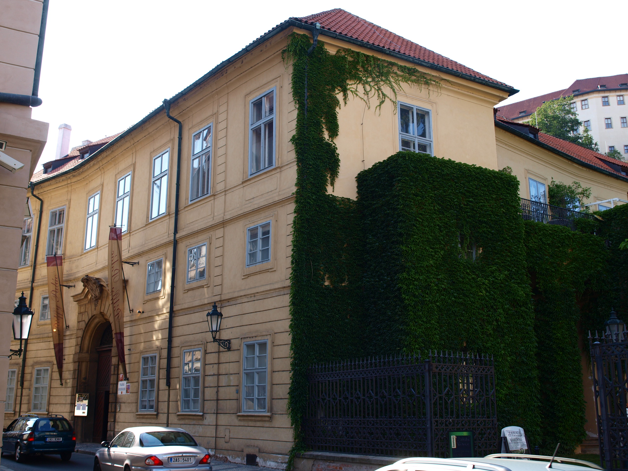 Pálffyho palác